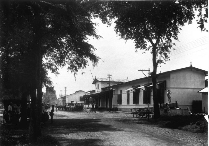 Foto. Het stationsgebouw te Djember op Oost-Java